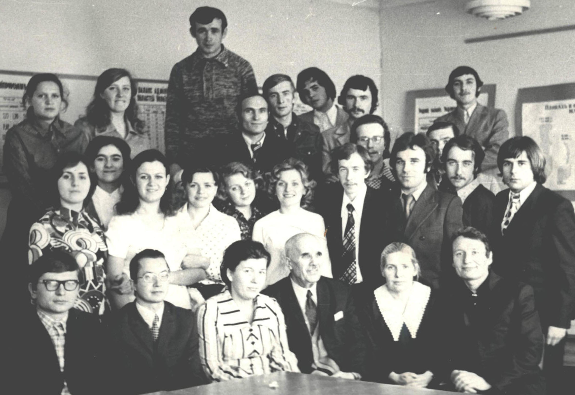 Викладачі та студенти 5-го курсу кафедри гідрології суші КНУ ім. Т. Шевченка , 1976 р. В 1-му ряду - викладачі, зліва: О.О.Косовець, Л.М.Горєв, Л.Г.Будкіна, С.П.Пустовойт (зав. кафедри), Л.М.Козінцева, С.М.Лісогор. В 2-му ряду - студенти, зправа: третій - В.К.Хільчевський